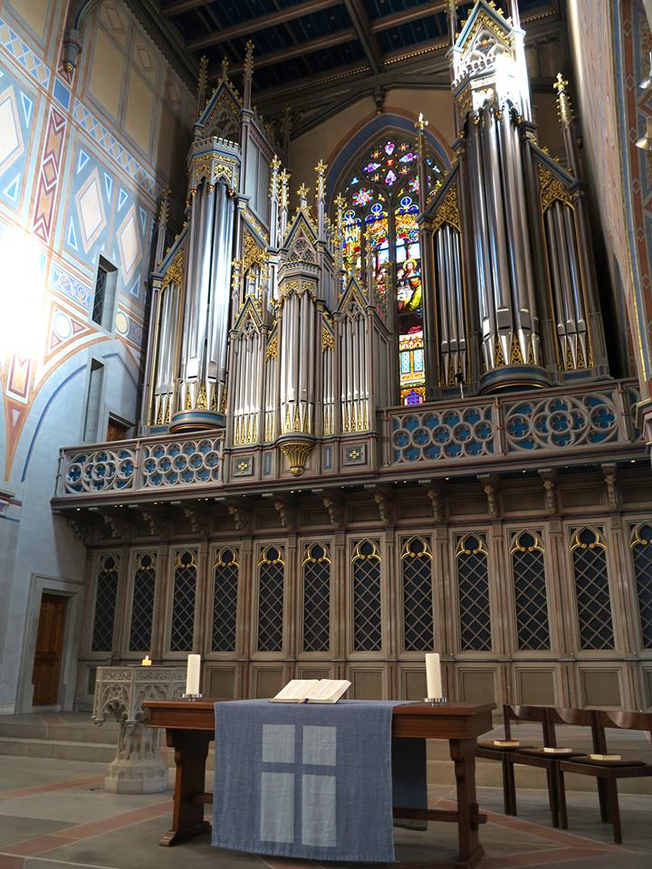 Blick auf die Hauptorgel der Kirche St. Laurenzen (evangelisch-reformierte Pfarrkirche der Stadt St. Gallen); Bild: F.A.